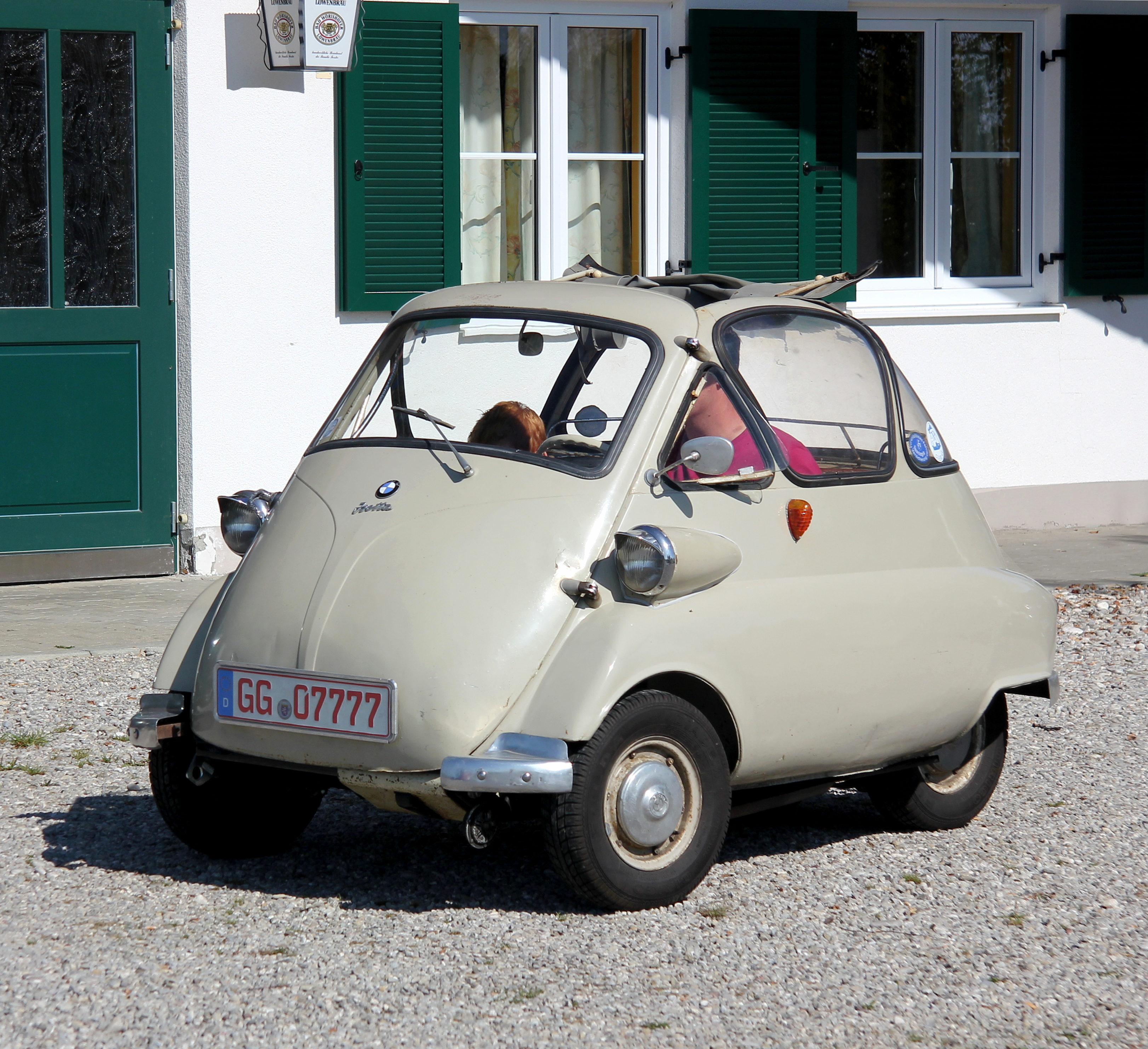 BMW Isetta, Baujahr 1955, beim Isetta-Treffen in Bad Wörishofen. Erkennbar ist die 1955er Version an den langgezogenen Scheinwerfern, ab 1956 waren sie rundlicher mit Abstand zur Karosserie. (Kennzeichen des Fahrzeugs verändert)